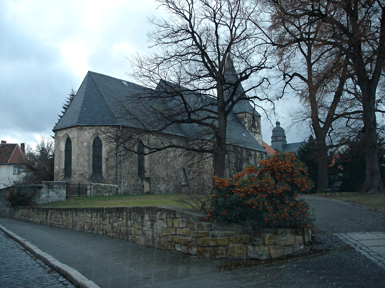 Ballenstedt, St. Nicolai, Jan 2005, Lange